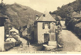 Entrée du village d'aas, c1910 - France